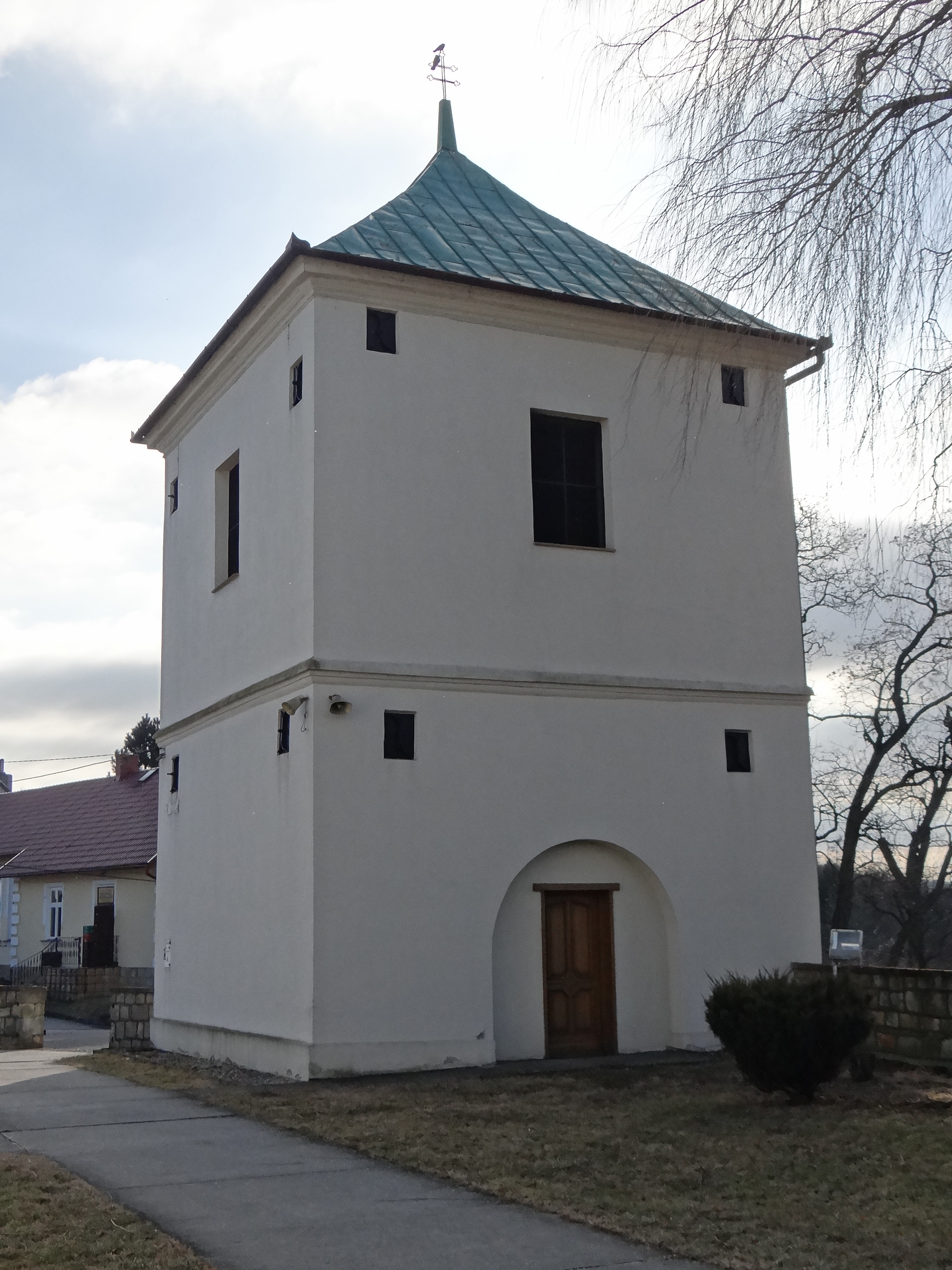 Chełm, kościół św. Jana dzwonnica, 1738–1749